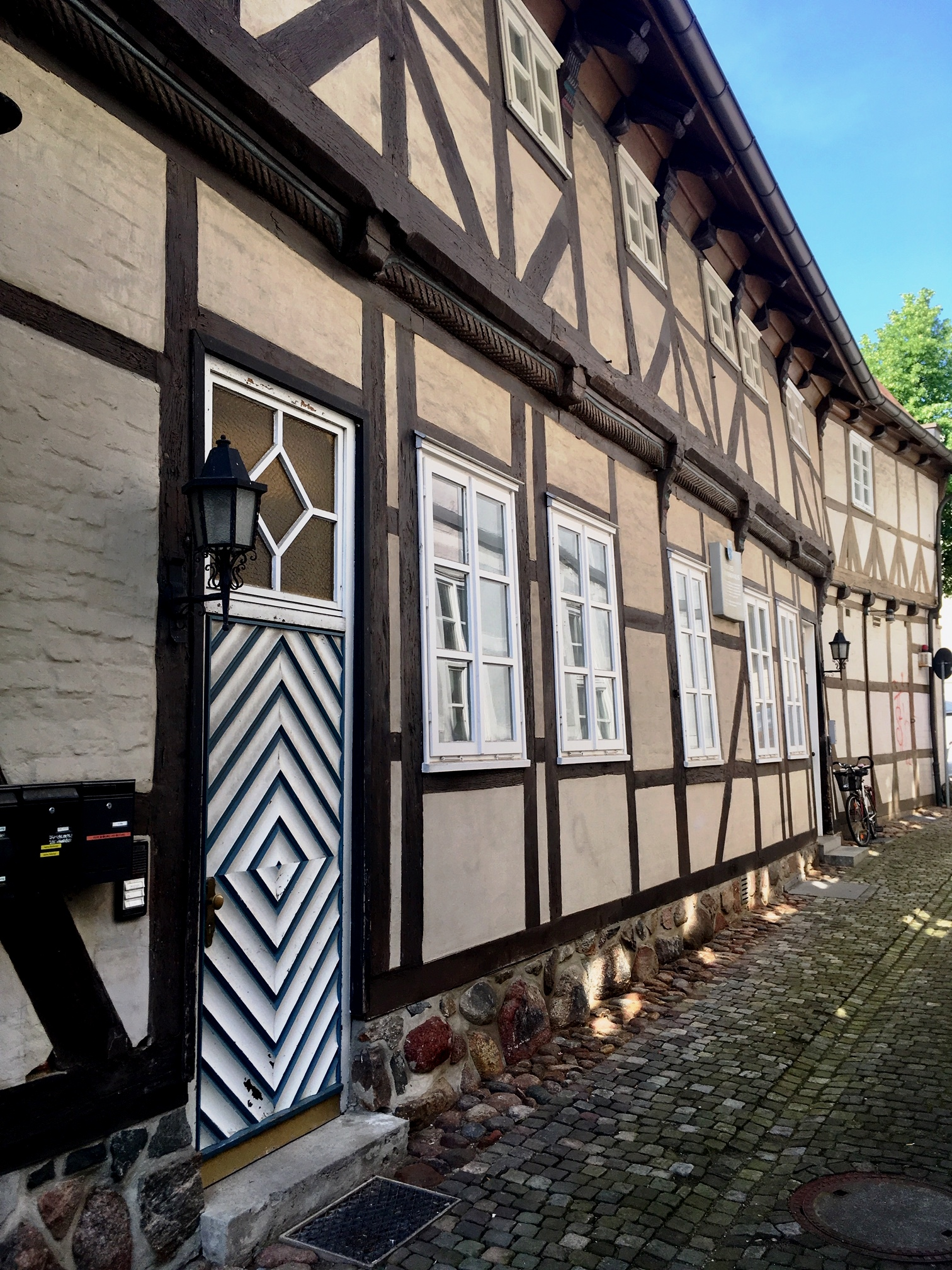 Ältestes Haus Uelzens